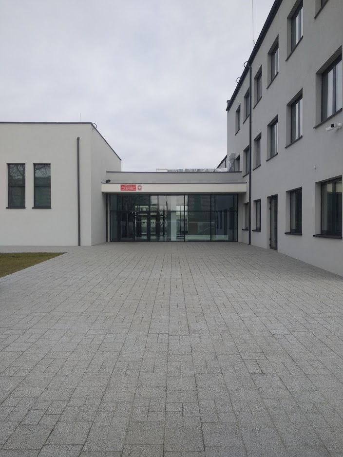 Centrum Nauk Technicznych i Nowoczesnych Technologii Państwowej Uczelni Zawodowej (ul. Energetyków, 2020 r.)